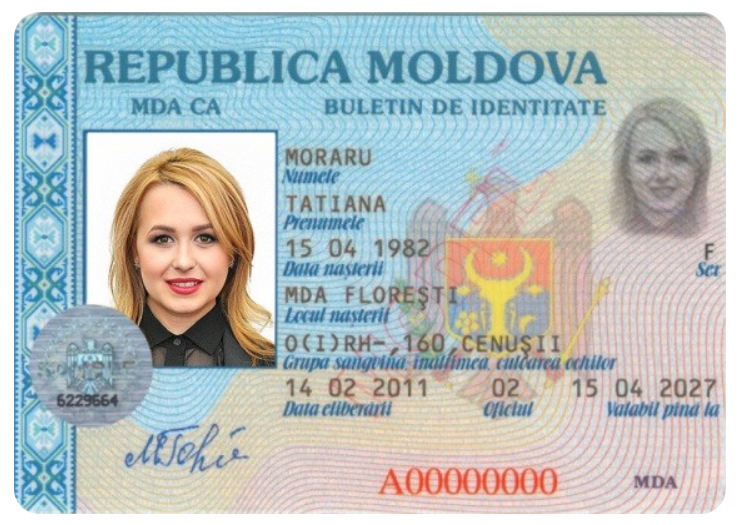 Buletin de identitate al cetăţeanului Republicii Moldova